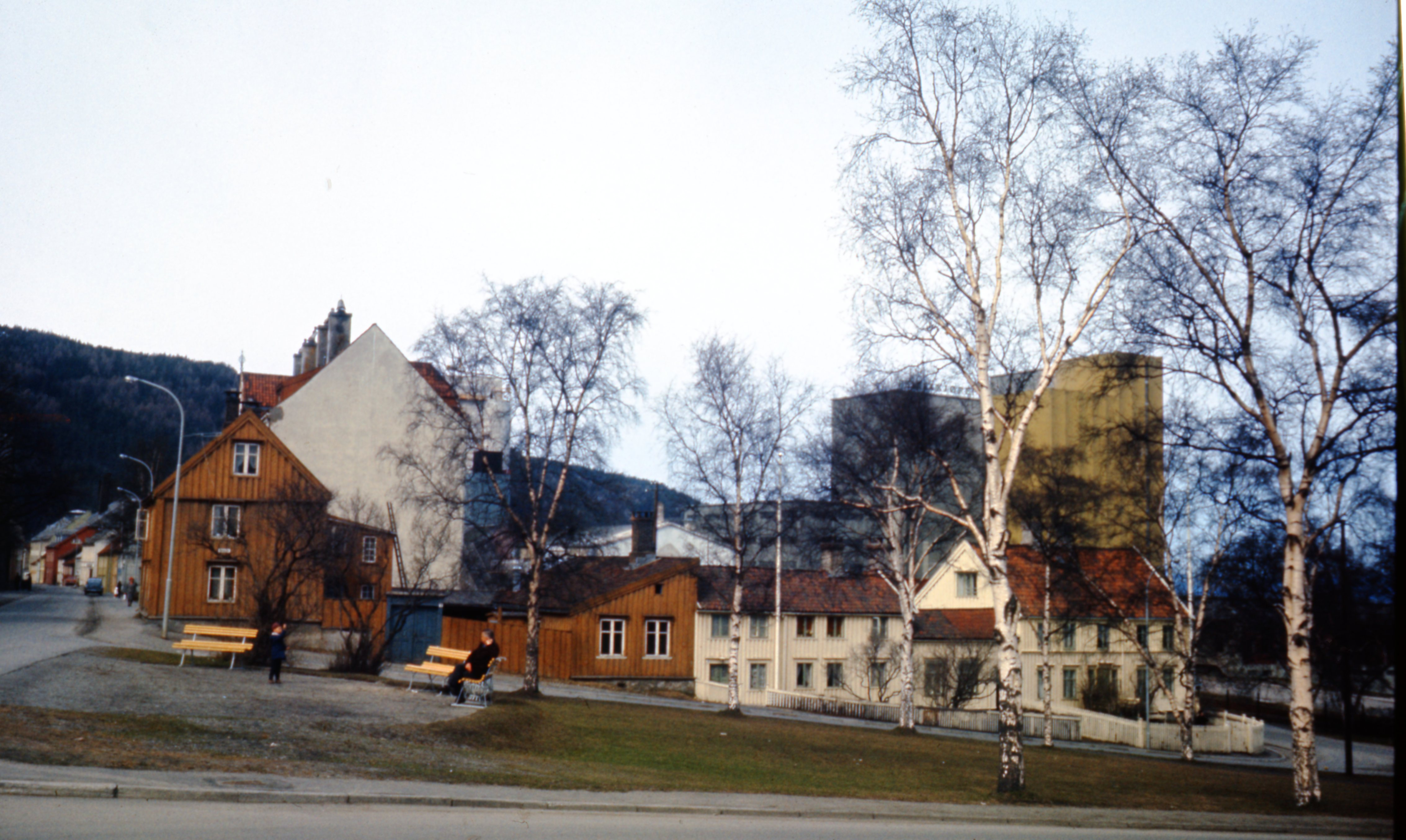 Format: Lysbilde i farge, positiv Film: Kodak Dato / Date: før rivingen i 1972 Fotograf / Photographer: Henning Meyer (1946 - 2004) Sted / Place: Østre Ila, Trondheim Google street view: goo.gl/maps/u7zbT Wikipedia: Østre Ila Eier / Owner Institution: Trondheim byarkiv, The Municipal Archives of Trondheim Arkivreferanse / Archive reference: Tor.H49.B80.F28436 Merknad: Informasjon fra byggesaksregisterkort for Østre Ilen 3, 4 og 5: 20.04.1971: Byplanrådet vedtar å regulere Mellomila 2 B/C og Østre Ila 3 og 4 til boligblokk for trygdede. 26.01.1972: Bygningsrådet godkjente søknad av 20.01.1972 fra Trondheim kommune ved arkitekt Ragnar Engh om oppførelse av boligblokk for trygdede. 09.02.1972: Bygningsrådet godkjente søknad av 26.01.1972 fra Boligkontoret om å få rive bebyggelsen. Alle leieforhold forutsatt opphørt før oppstart av rivingsarbeidet. Fylkeskonservatoren meddeles vedtaket. [BM: Østre Ila 3 eksisterer fortsatt som parsellen på hjørnet til det som i dag er Østre Ila 1] 04.09.1974: Bygningsrådet godkjente byggemelding fra Trondheim kommunale byggekomité på trygdebolig på Østre Ila 5. Trygdeboligen føres opp som et annet byggetrinn for trygdeboliger på Østre Ila 3 og 4. Con-Tra-Ship Inc. A/S ved F. Rambech sendte inn en protest mot byggemeldingen datert 30.07.1974, denne ble ikke tatt til følge av bygningsrådet. 02.10.1974: Bygningsrådet godkjente søknad fra Trondheim kommune v/ Boligsjefen om tillatelse til riving av bestående bebyggelse på Østre Ila 5.